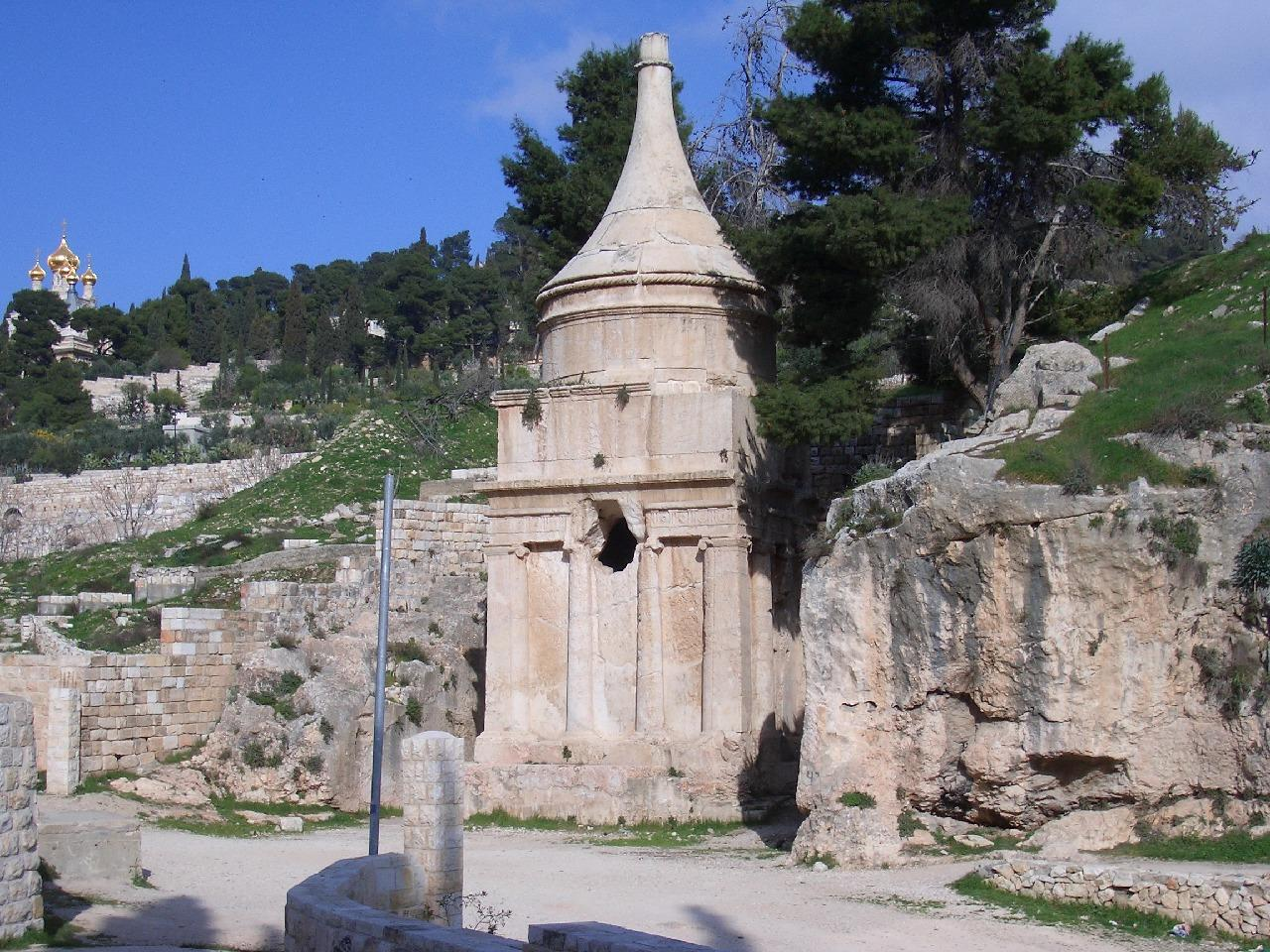 Das "Grab des Abschalom" im Kidrontal in Jerusalem.